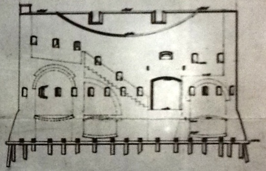 Teekening van een verdedigbaar Wachthuis te bouwen in het Fort Hinderdam, 1e Fortificatie Directie Naarden. Hinderdam den 11 September 1848 Plans van Vestingen Litt.H. no. 107 Detail van scan van Stichting Menno van Coehoorn (nr 55149)